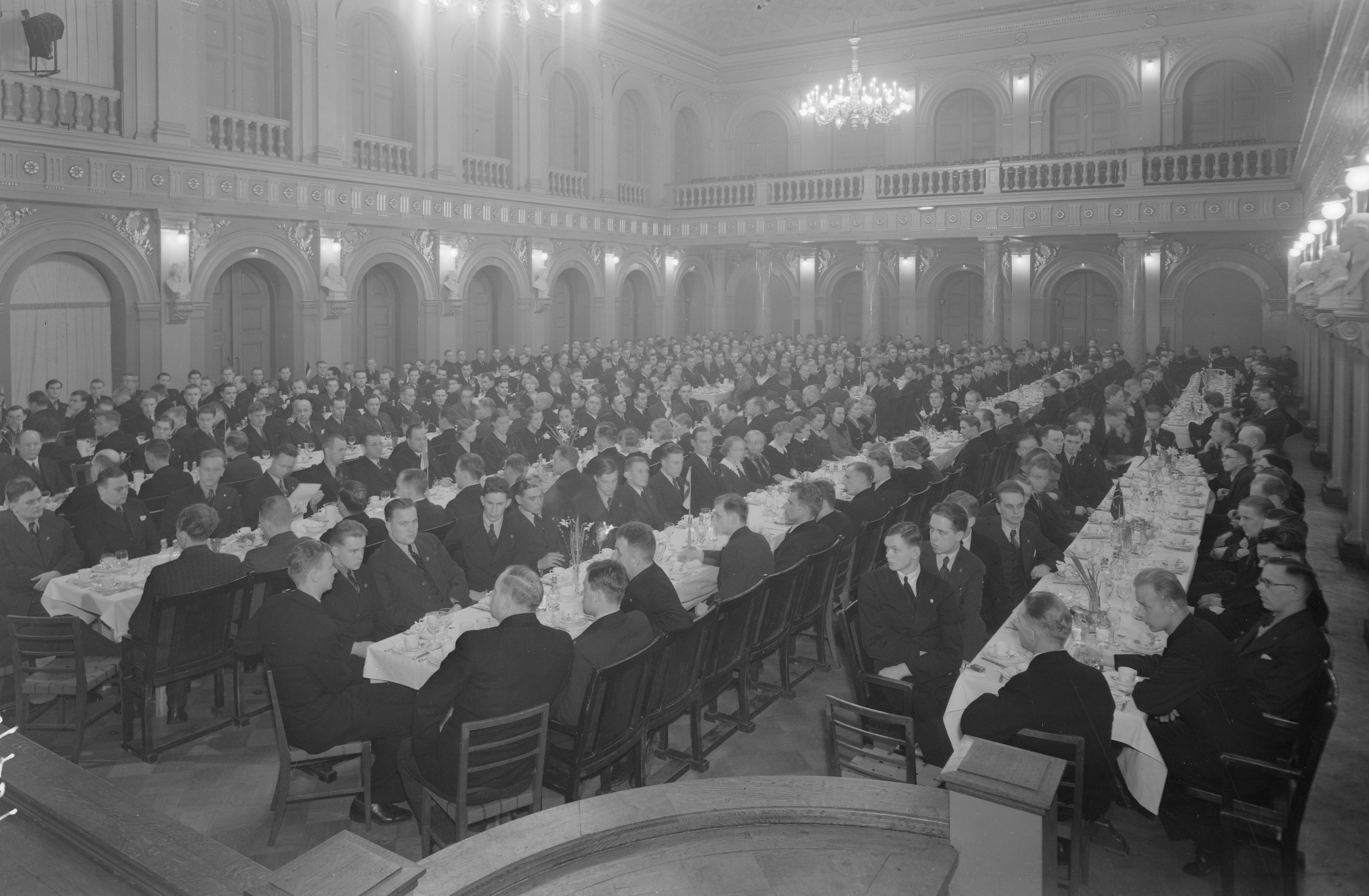 Akateemisen Karjala-Seuran 15-vuotisjuhlat Vanhalla ylioppilastalolla 21.2.1937